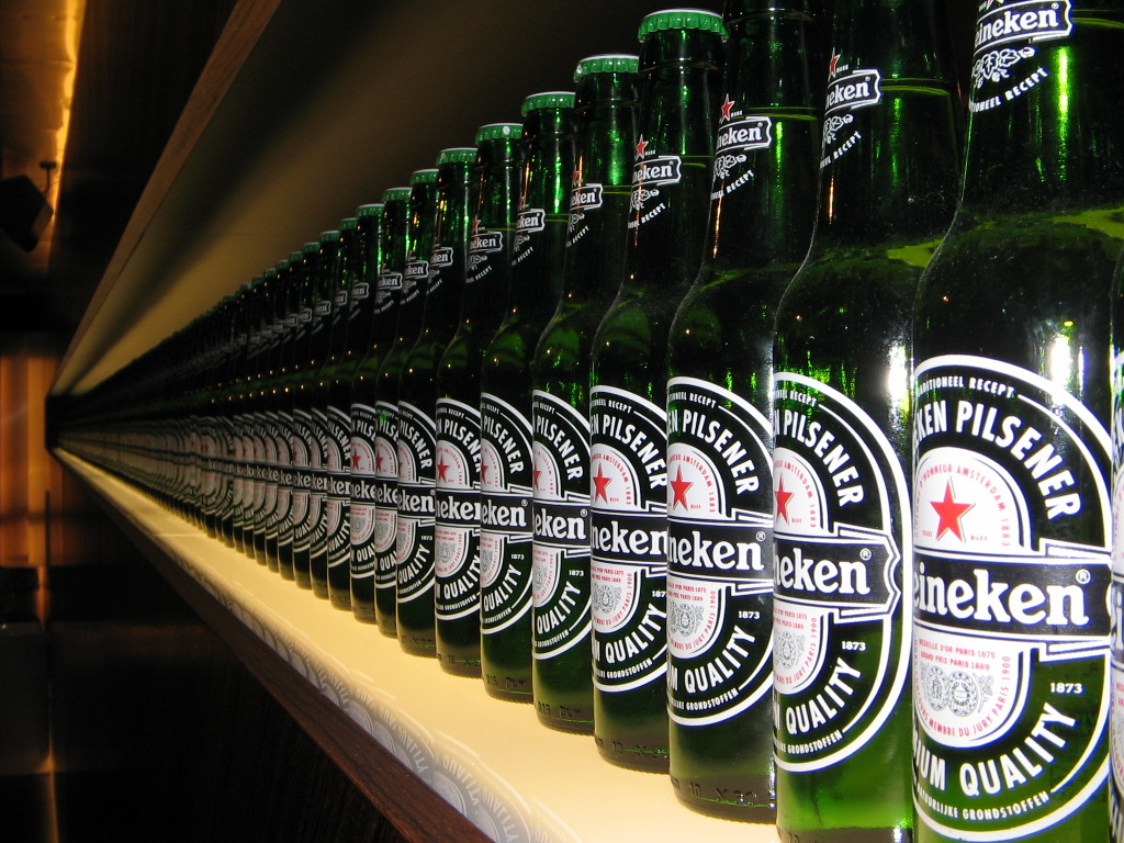 Bottles in the Heineken Brewery